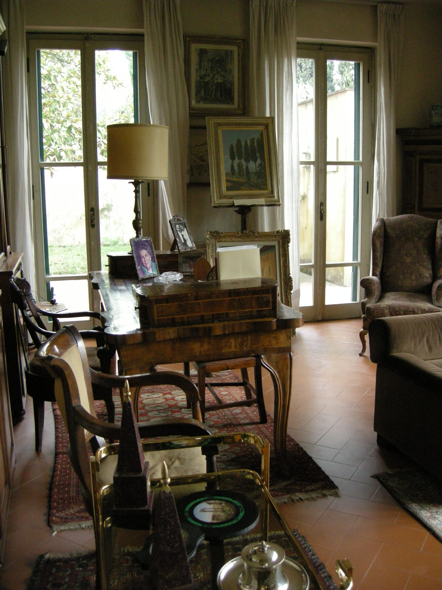 Piano terra, salotto, scrivania spadolini